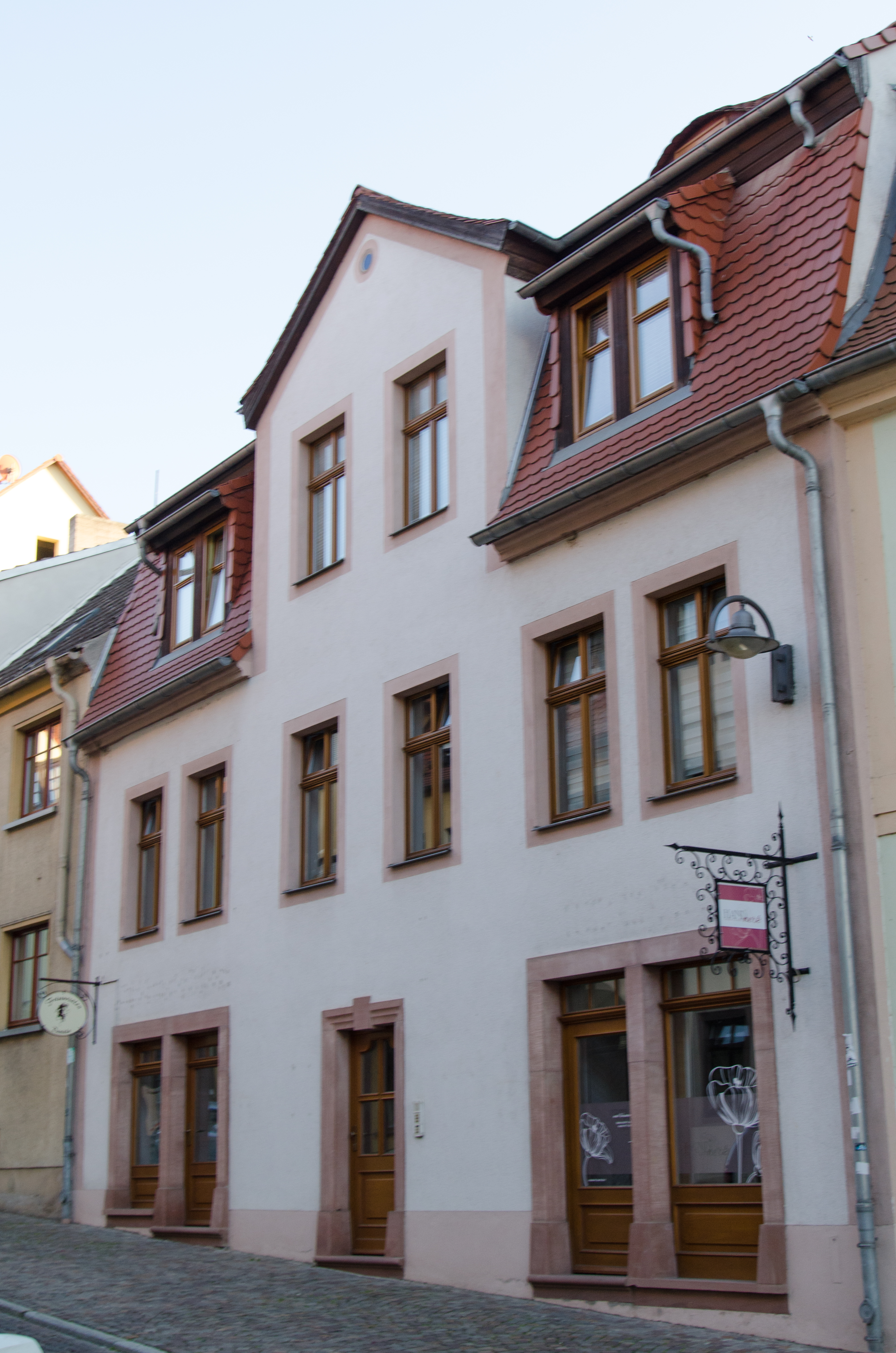 Querfurt, Nebraer Straße 10